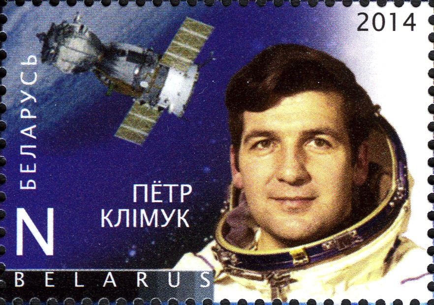 Паштовая марка Беларусі "Заваёўнікі космасу, ураджэнцы Беларусі"